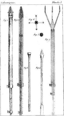 Trilabe sviluppato da Civiale per la litotrissia vescicale (immagine d'epoca)